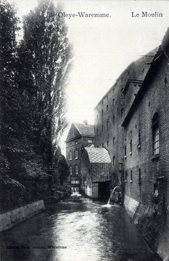 Oleye - Ancienne minoterie vers 1910 (moulin Lejeune)